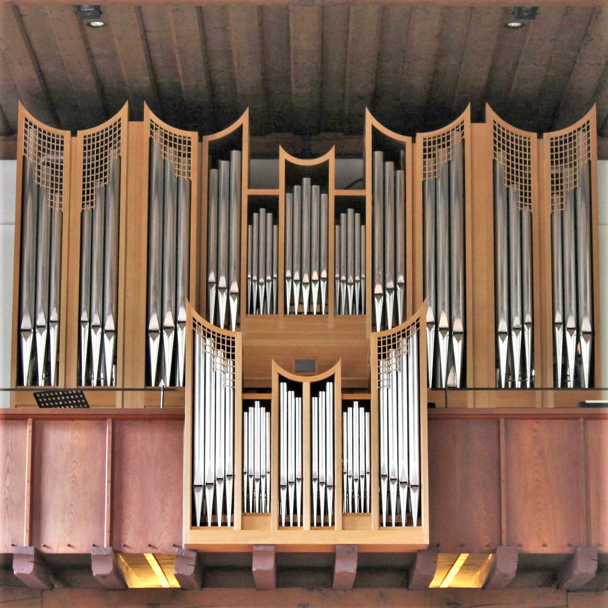 Orgel von Christi Himmelfahrt in München-Waldtrudering